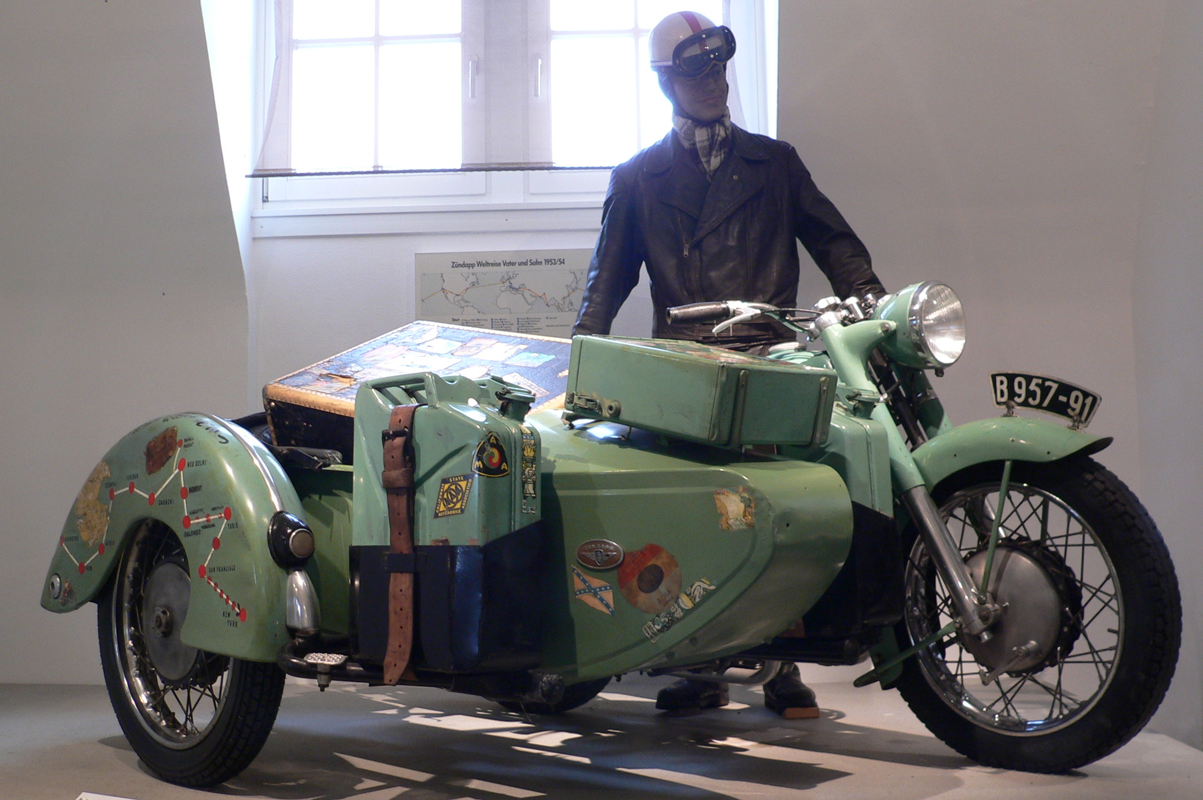 Motorbike "Zündapp KS601" (1953) "The green elephant" at the Deutsches Zweirad- und NSU-Museum (597 cm³, Zweizylinder-Boxermotor, 28 PS bei 4.700 U/min, 130 km/h)